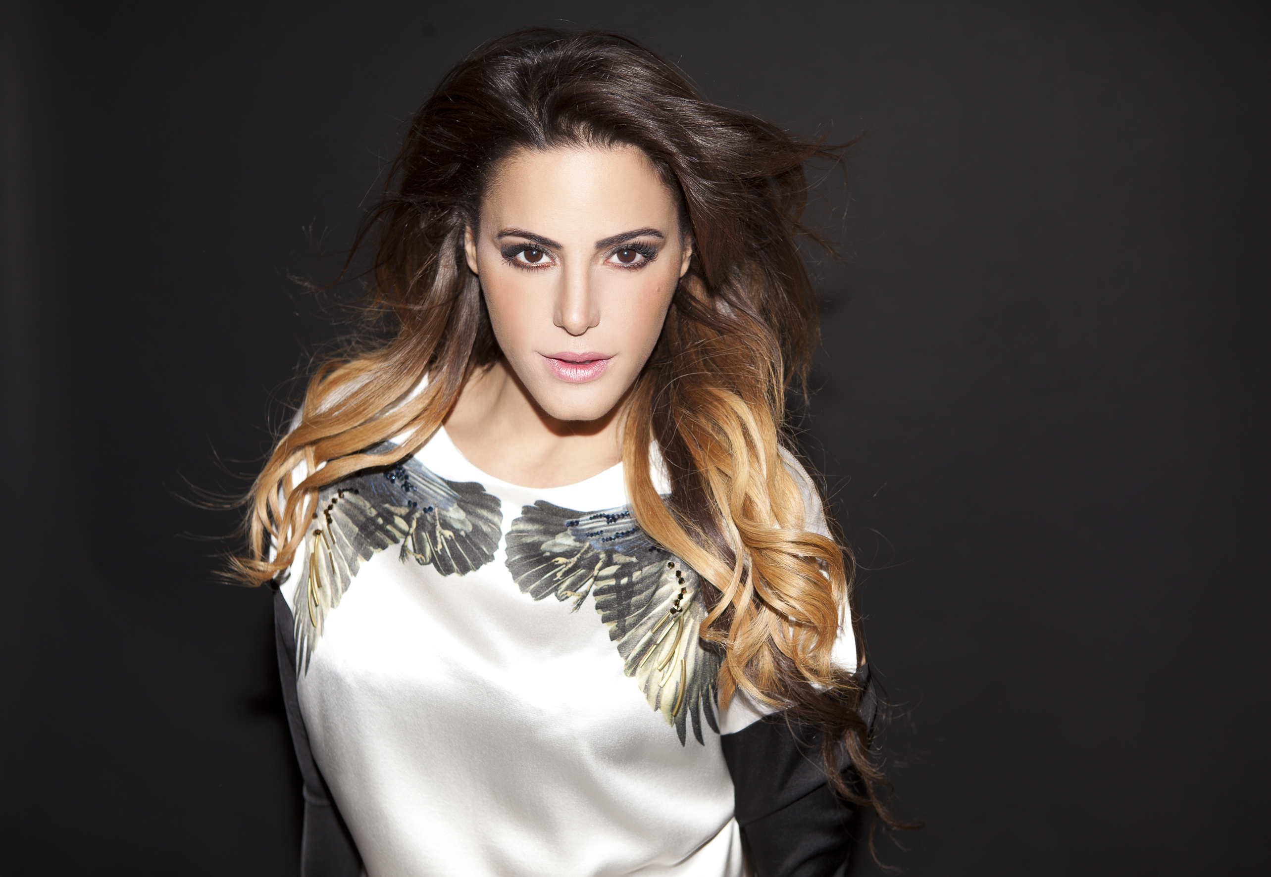 נסרין קדרי